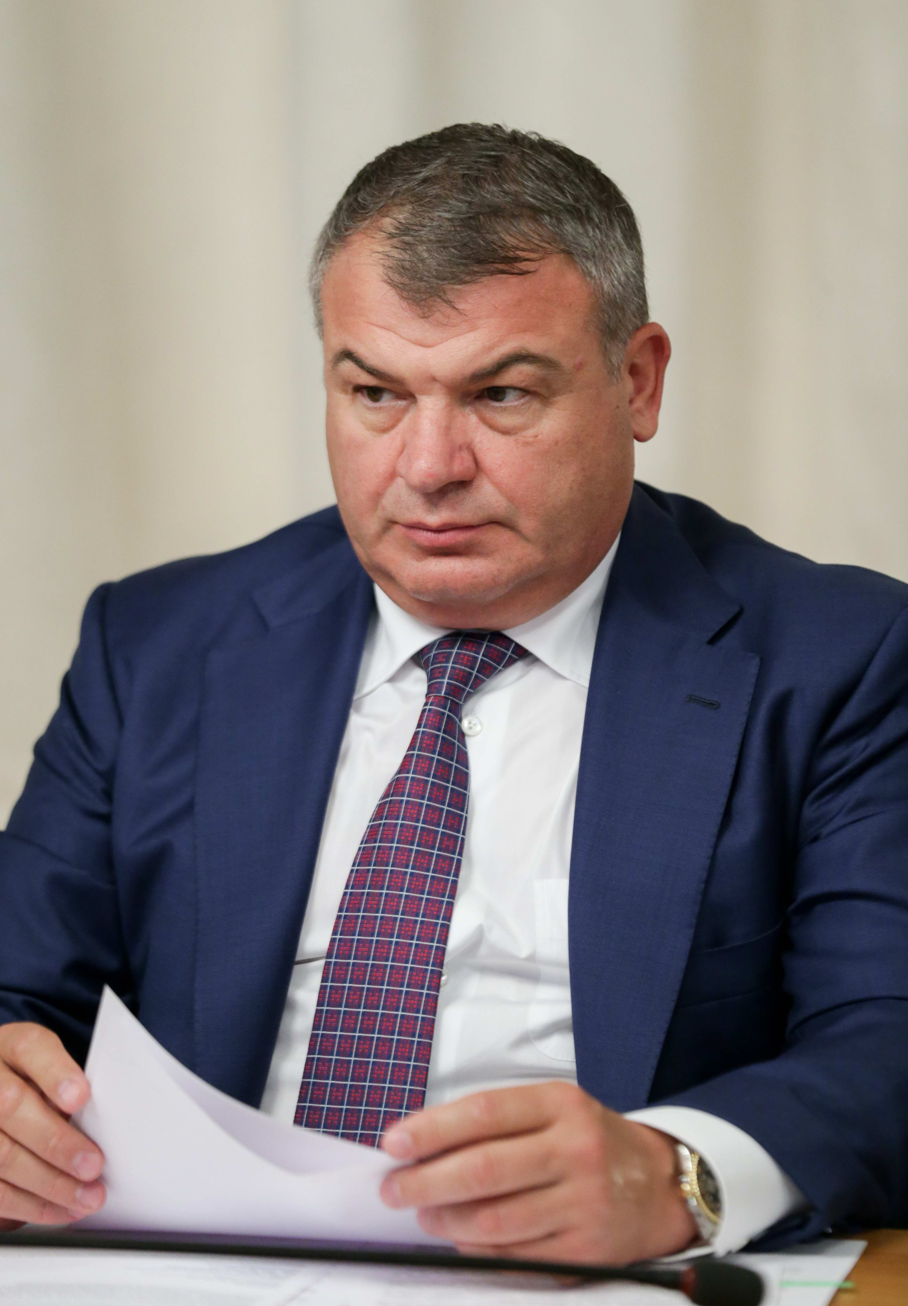 Анатолий Эдуардович Сердюков (род.1962) — российский государственный деятель